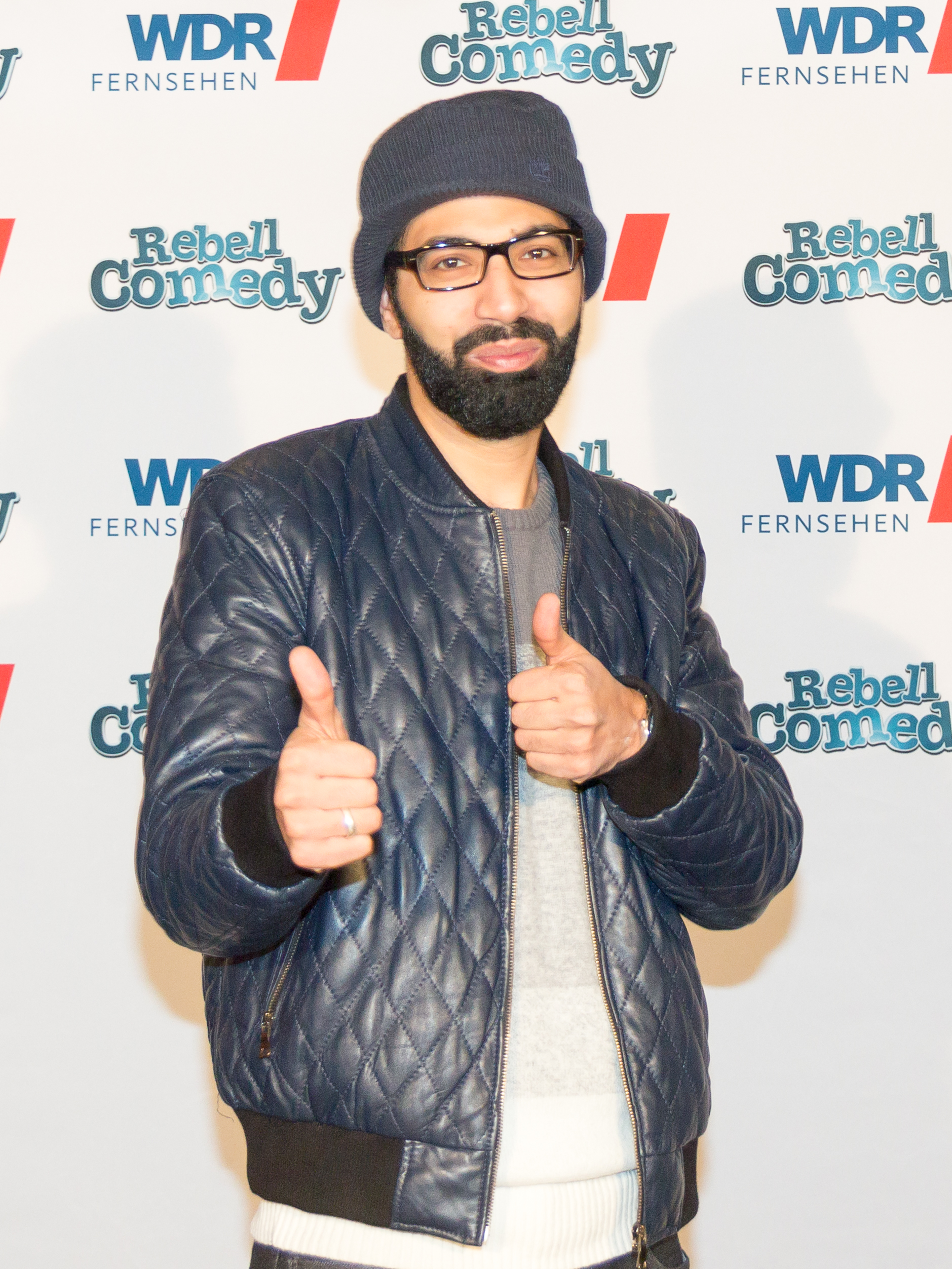 RebellComedy - WDR-Pressetermin im Gloria Foto: Benaissa Lamroubal